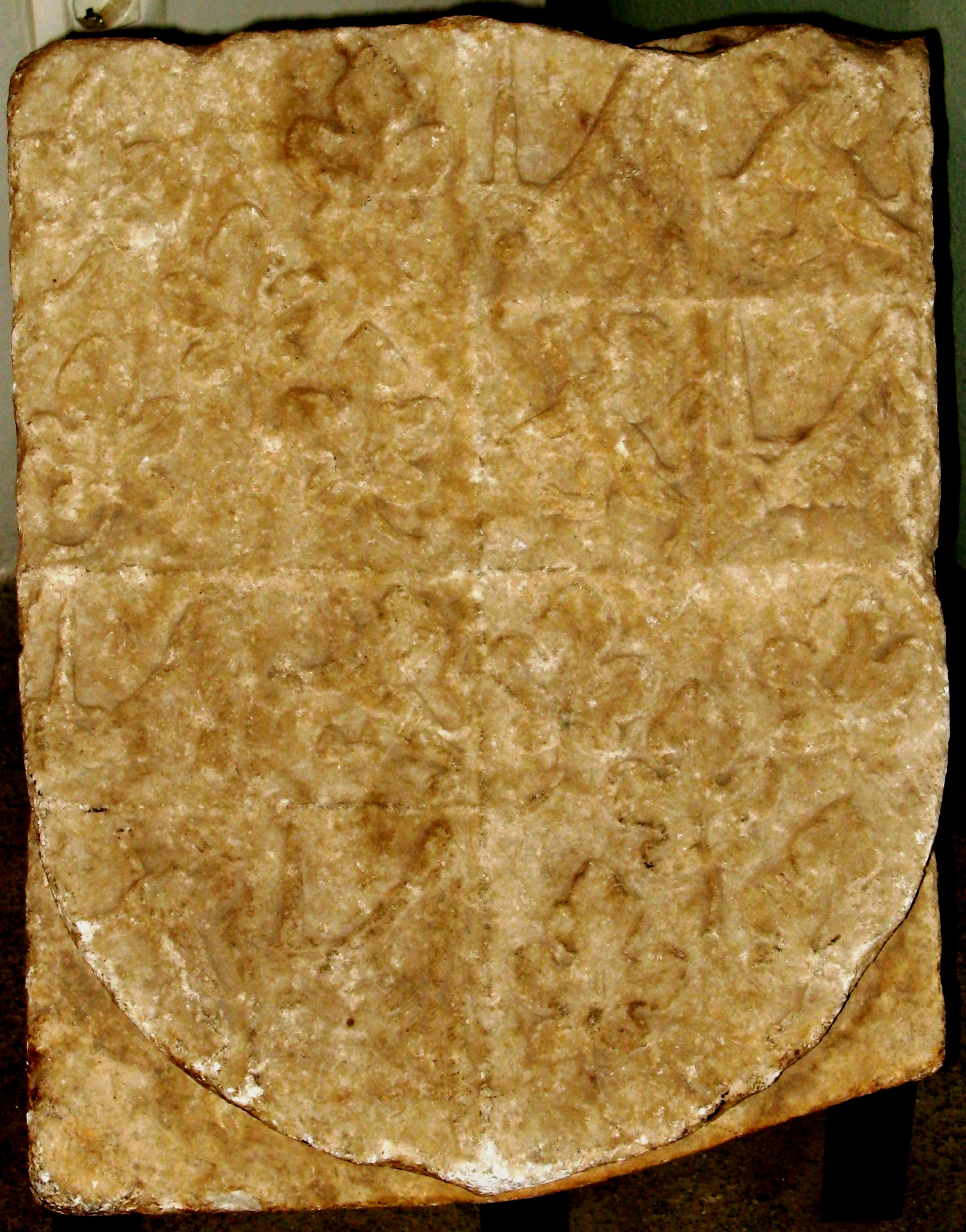 Escudo de armas del II Conde de Feria